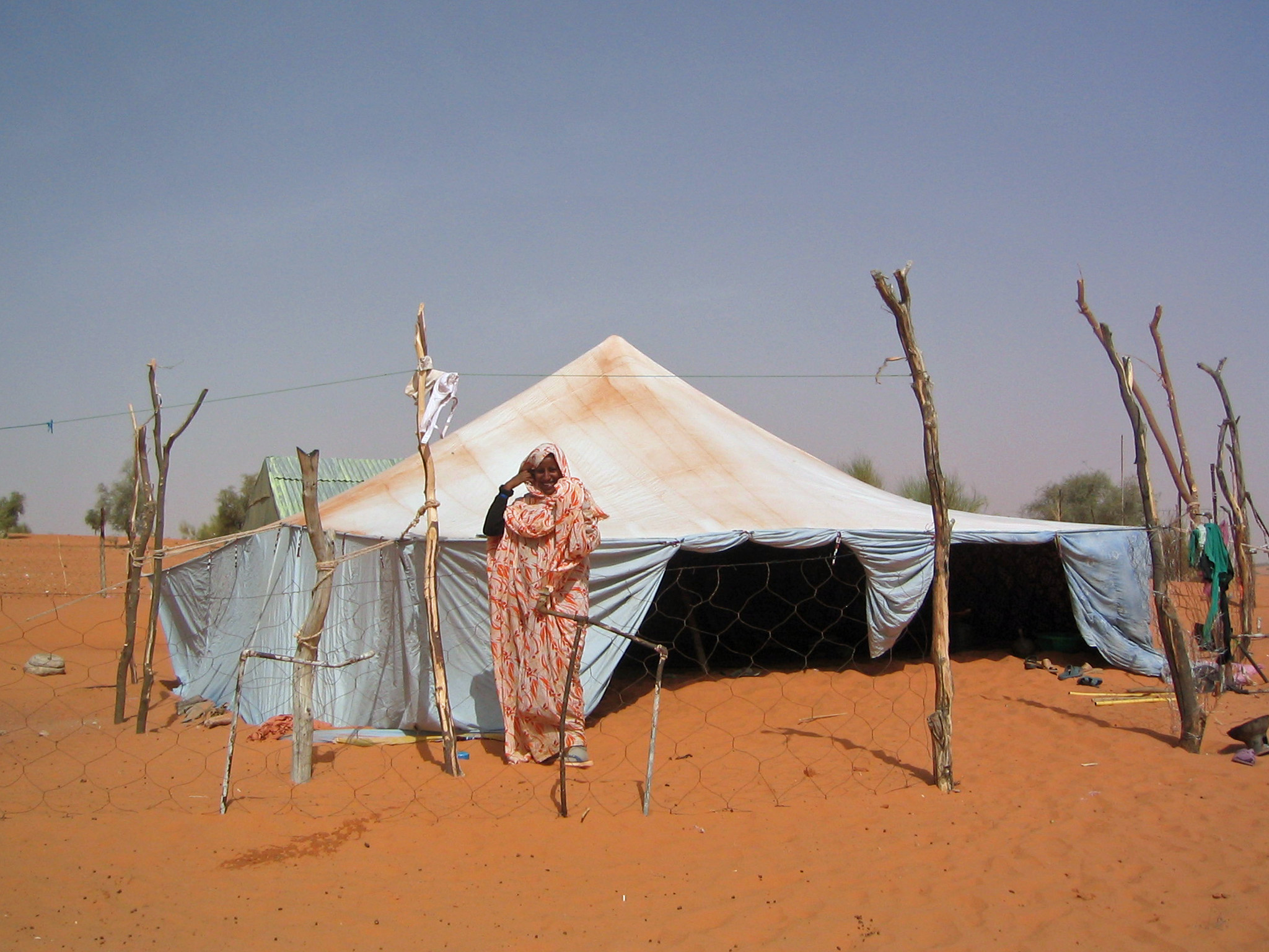 Jeune fille nomade (16 ans) devant la tente familiale à Matamoulane, dans la région du Trarza (Mauritanie)